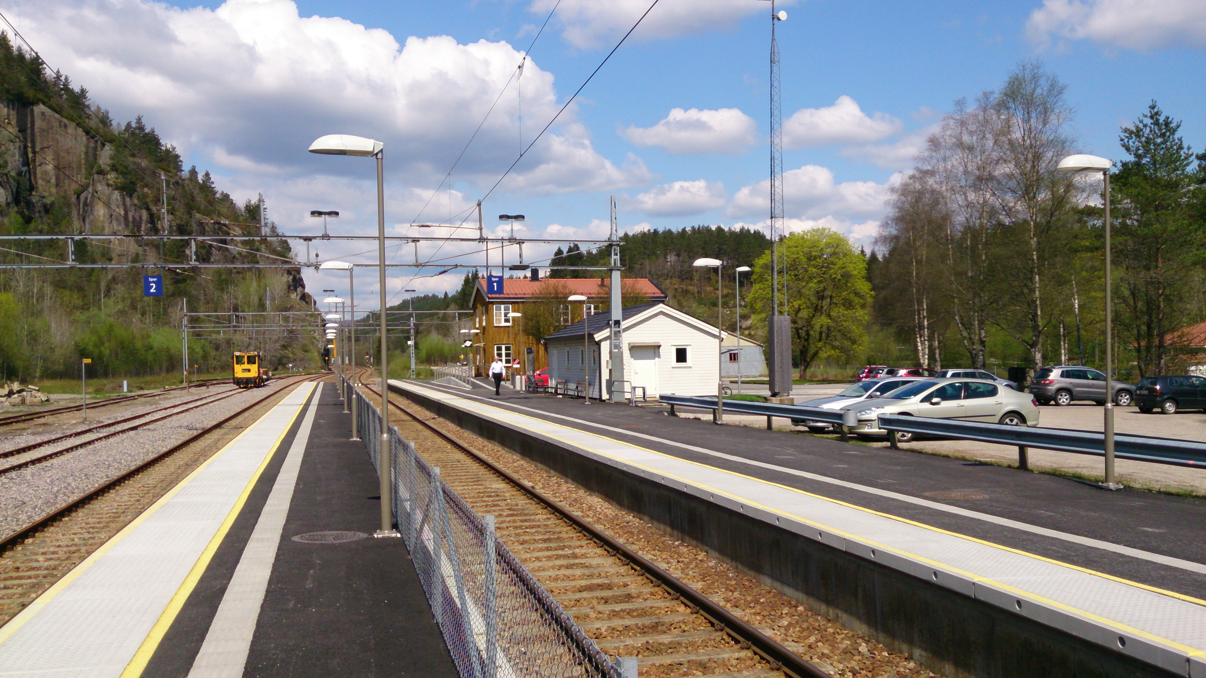 Marnardal Stasjon 19. mai 2013